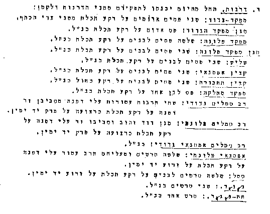 Hagana Ranks 1948